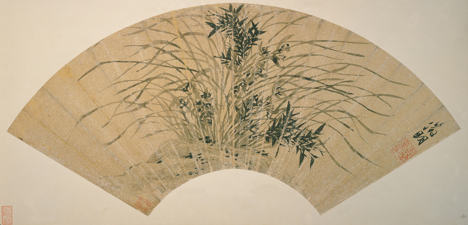 選自〈明諸臣書畫扇面〉